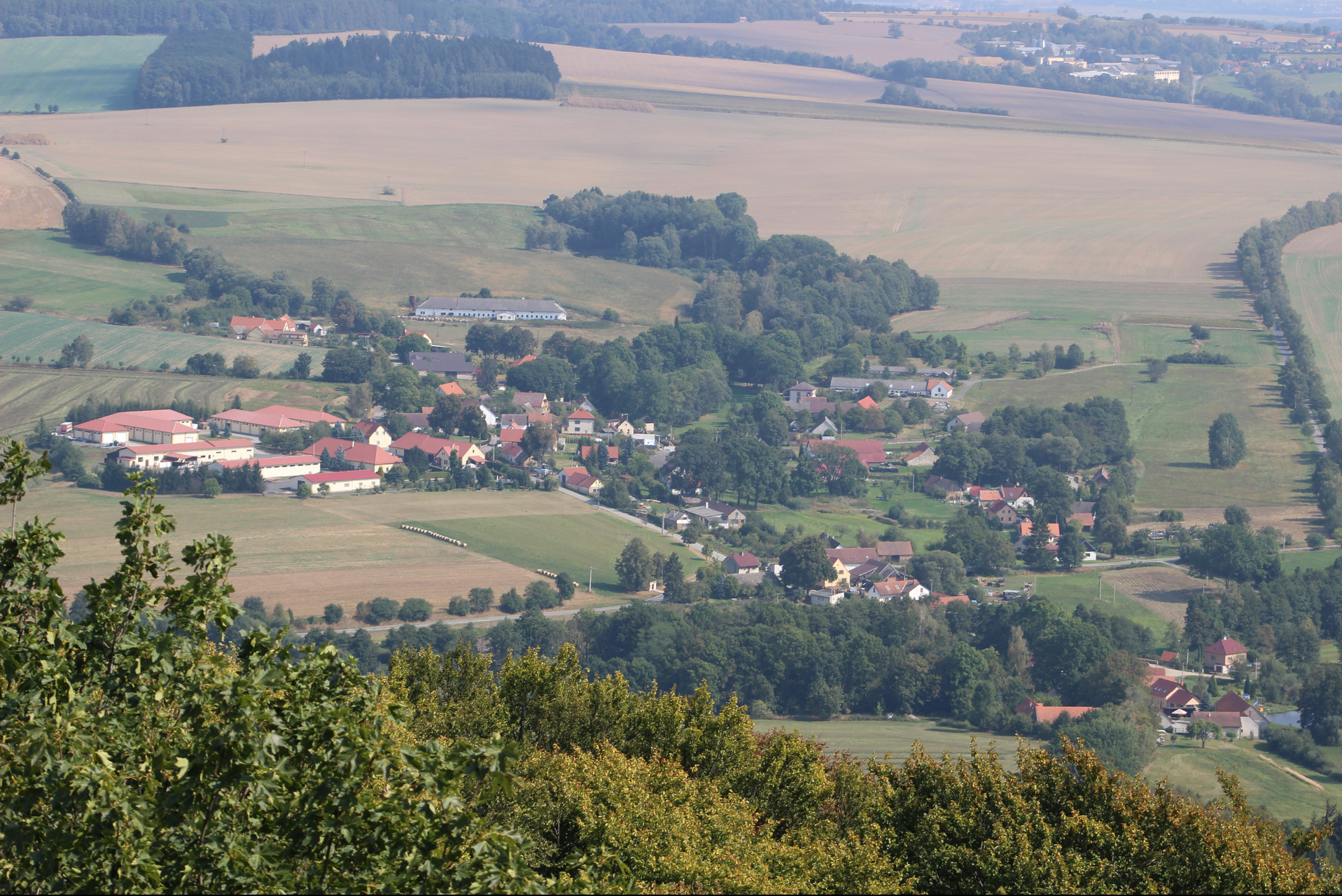 Křížov, část obce Pravonín, okres Benešov, Středočeský kraj, pohled z rozhledny na Velkém Blaníku